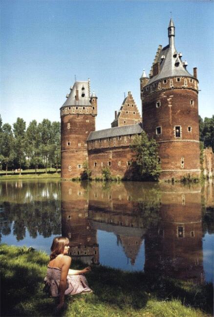 Beersel, het kasteel. Het is het decor voor een Suske en Wiske-strip. - Foto: © Photo: Jean-Pol Grandmont. Beersel, het Kasteel, foto gemaakt en aangeboden voor vrij gebruik door gebruiker:Jean-Pol GRANDMONT